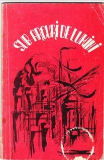 Volum "Sub arcuri de lumini"